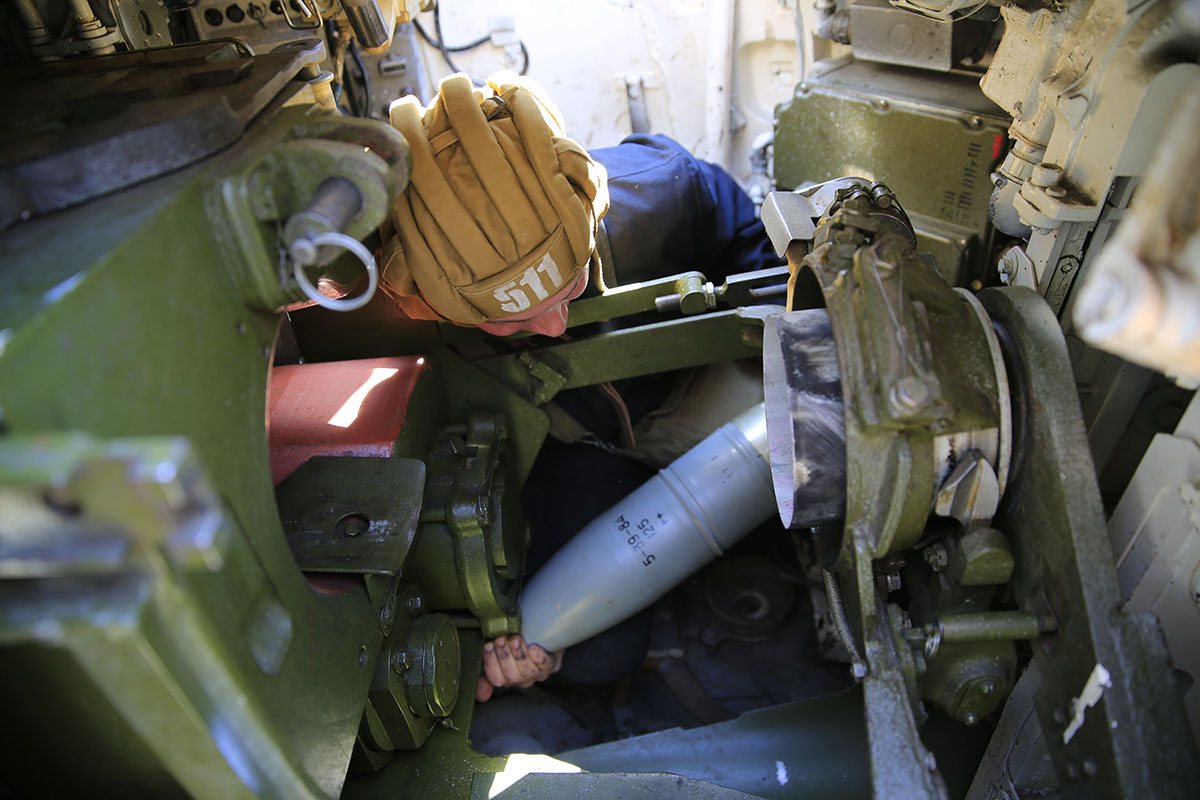 Стрельбы танковых подразделений 150-й мотострелковой дивизии Южного военного округа на полигоне Кадамовский